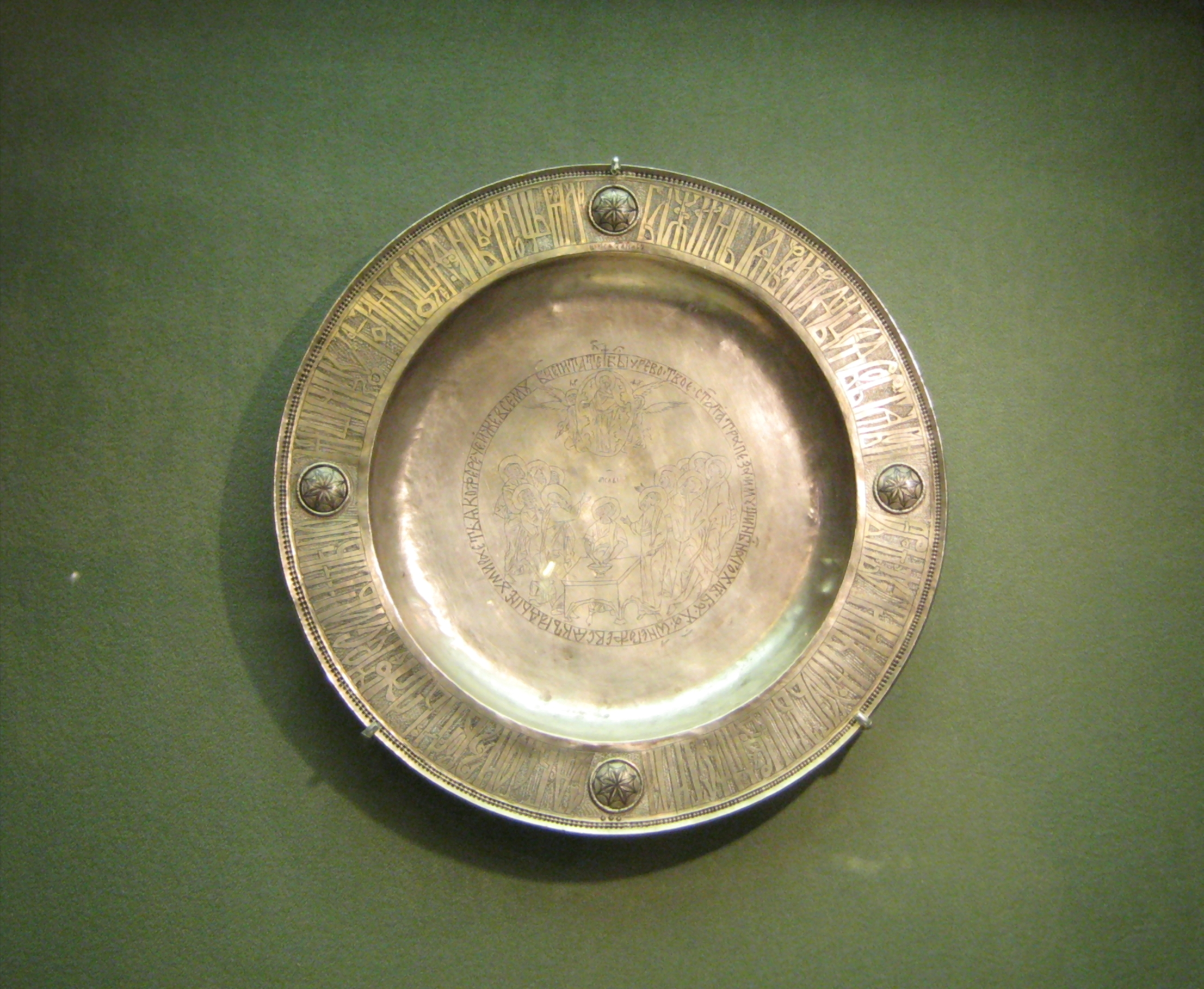 Тарель. Псков. Конец 15 - начало 16 века. Серебро, чернение, гравировка, скань. Изображение: "Богоматерь и апостолы". Надпись: "Бысть чрево твое святая трапеза, имущая небесный хлеб".